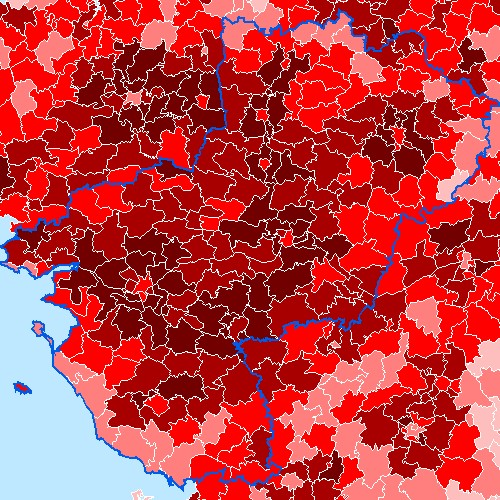 Carte de la proportion des moins de 20 ans dans la population de la région Pays-de-la-Loire, par cantons, en 1999. Légende : Image:-20ans1999-canton legende.jpg Cette carte est généreusement fournie par l'IAAT (Institut atlantique d'aménagement du territoire) Je la place comme convenu avec eux sous licence GFDL Utilisateur:Archeos